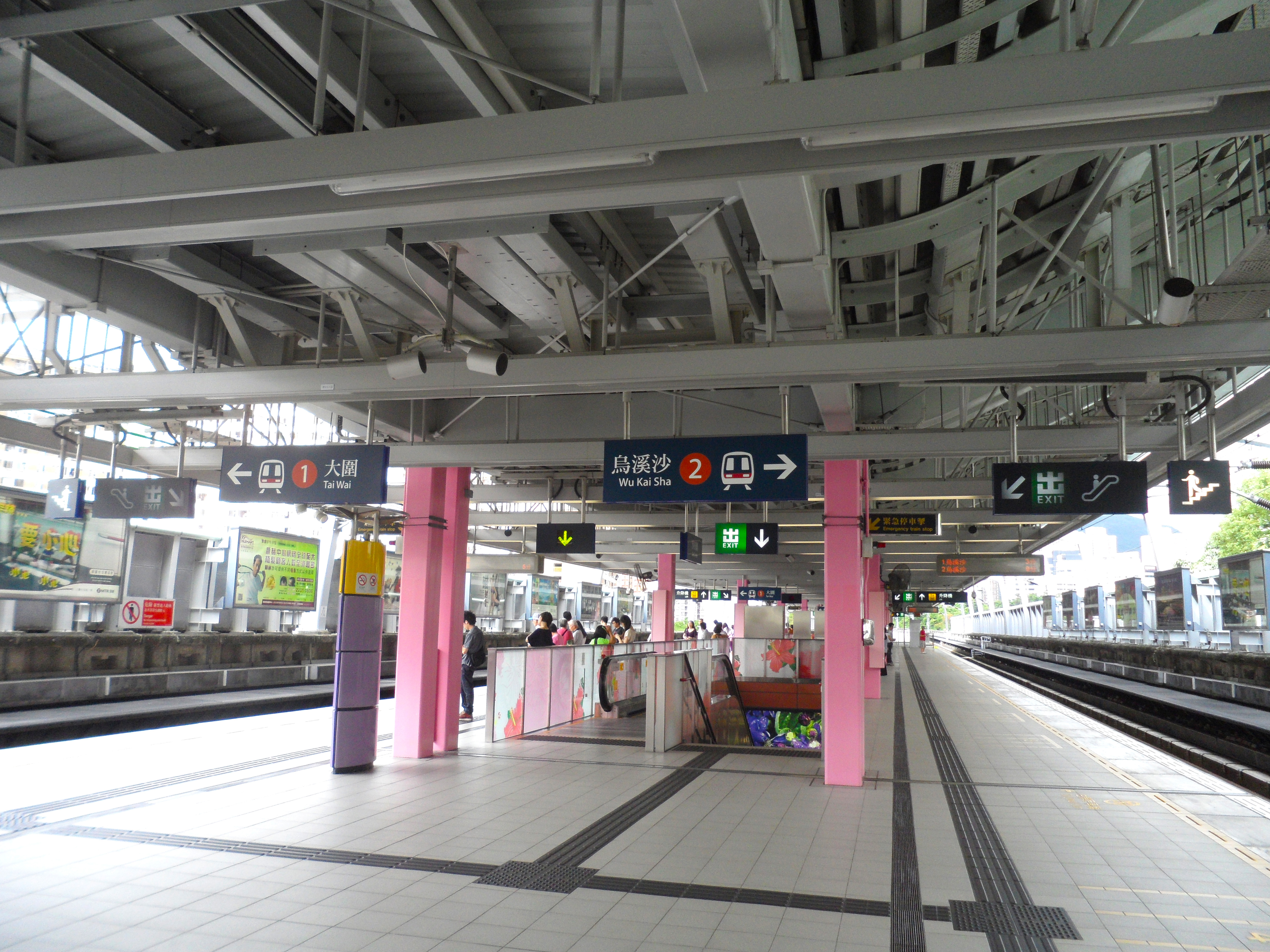 港鐵沙田圍站月台中央